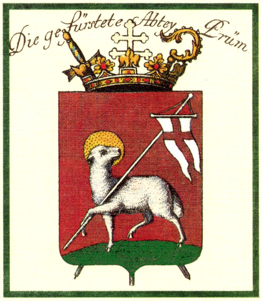 Wappen der Fürstabtei Prüm, From German WP: Wappen der gefürsteten Reichsabtei Prüm, Quelle = Stadt Prüm, Urheber = ER, Datum = 5/07, Genehmigung = Stadt Prüm, This image (or other media file) is in the public domain because its copyright has expired. This applies to Australia, the European Union and those countries with a copyright term of life of the author plus 70 years. You must also include a United States public domain tag to indicate why this work is in the public domain in the United States. Note that a few countries have copyright terms longer than 70 years: Mexico has 100 years, Colombia has 80 years, and Guatemala and Samoa have 75 years, Russia has 74 years for some authors. This image may not be in the public domain in these countries, which moreover do not implement the rule of the shorter term. Côte d'Ivoire has a general copyright term of 99 years and Honduras has 75 years, but they do implement the rule of the shorter term. This file has been identified as being free of known restrictions under copyright law, including all related and neighboring rights.